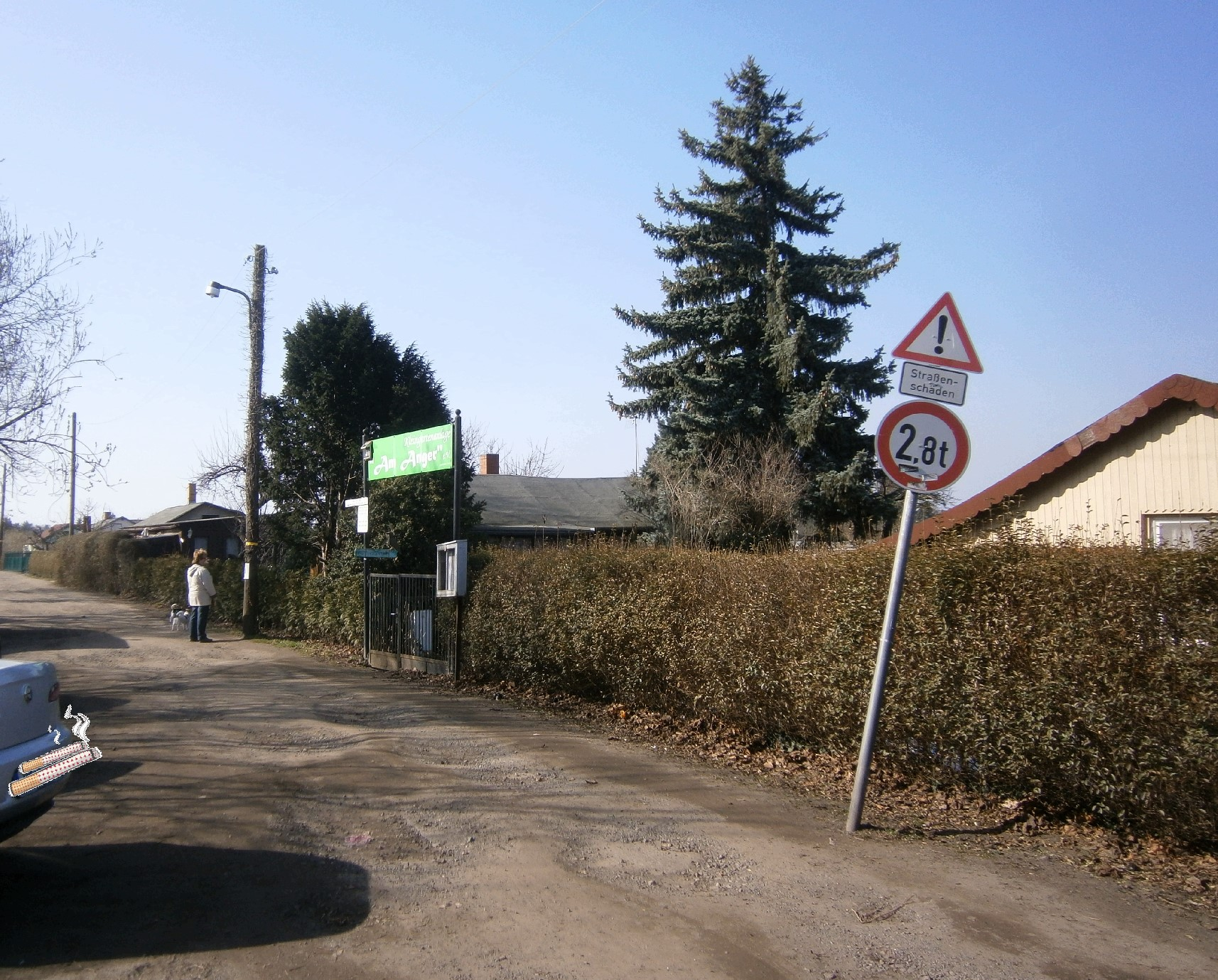 Nordendstraße ist eine ortsteiltrennende Straße zwischen Rosenthal und Niederschönhausen. Hier die Nordseite der Straße, die zu Berlin-Rosenthal gehört, nach Westen gesehen Höhe Blumenthalstraße. Hier der Eingang zur KGA Am Anger.